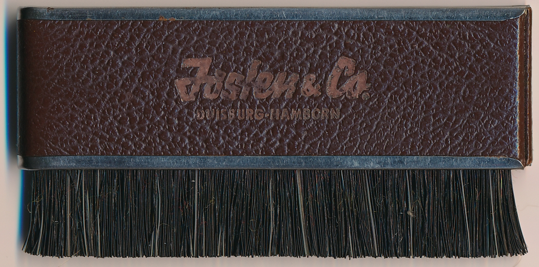 Taschenkleiderbürste ausgeschoben